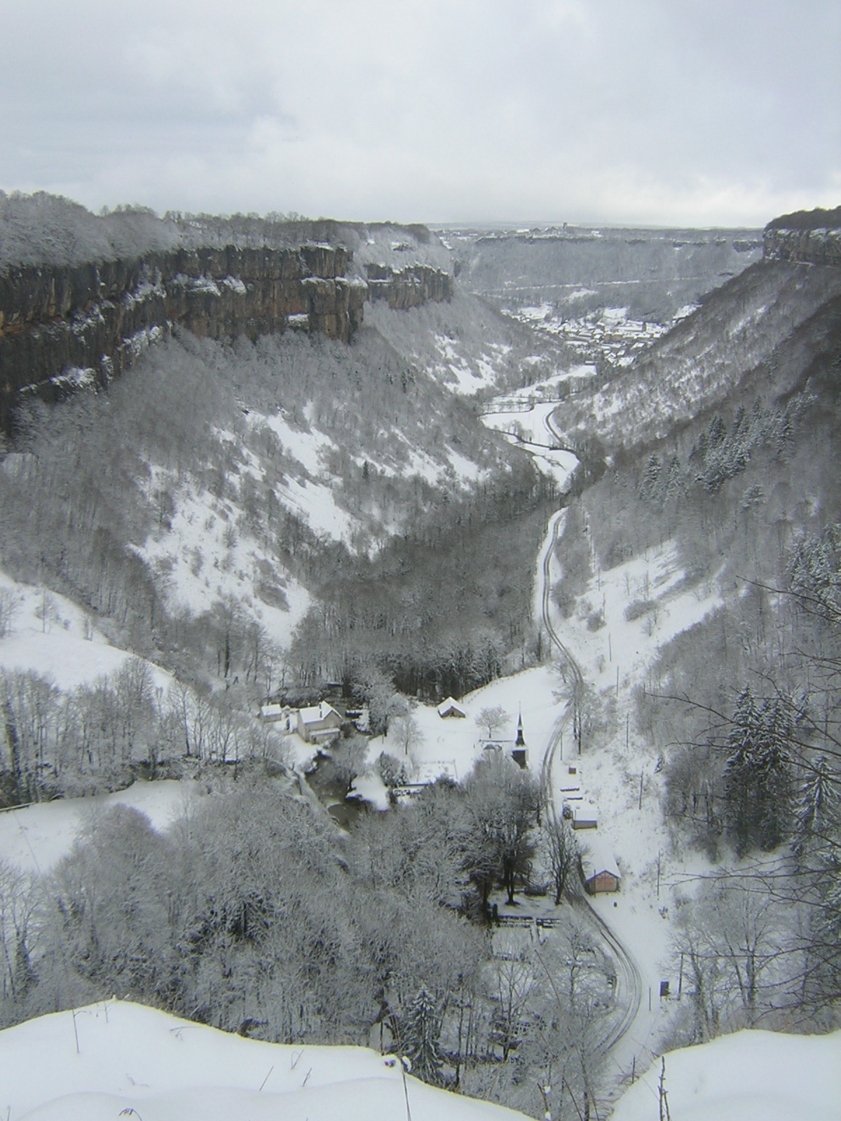 Vue de Baume-les-Messieurs (Jura) depuis le belvedère de Crançot. Les batiments au premier plan sont ceux liés aux cascades et aux grottes de Baume. On apperçoit au fond le cœur du village.